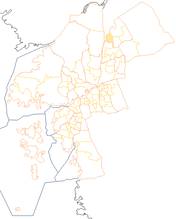 Karta som visar primärområdes belägenhet i Göteborg